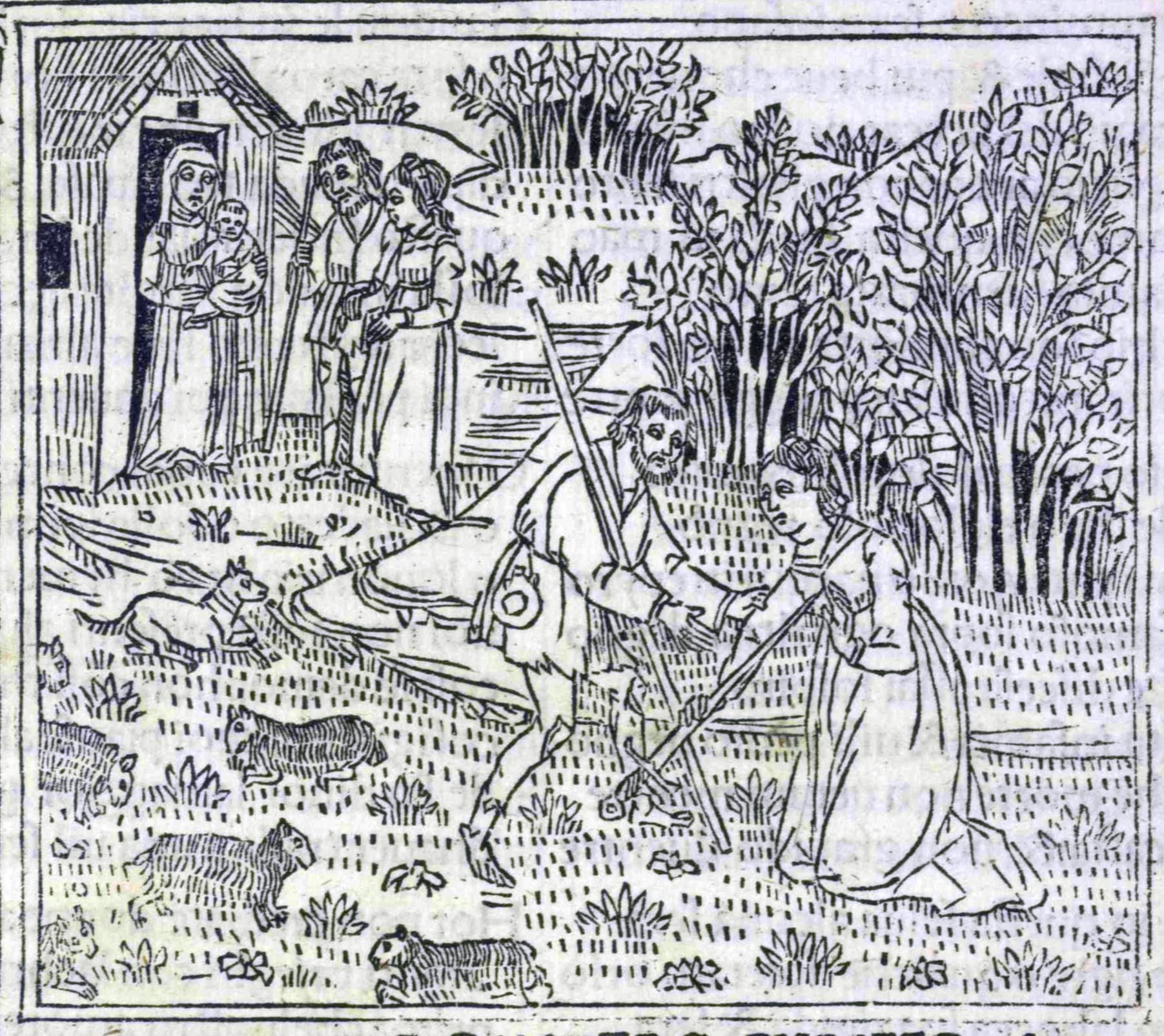 carta A2r